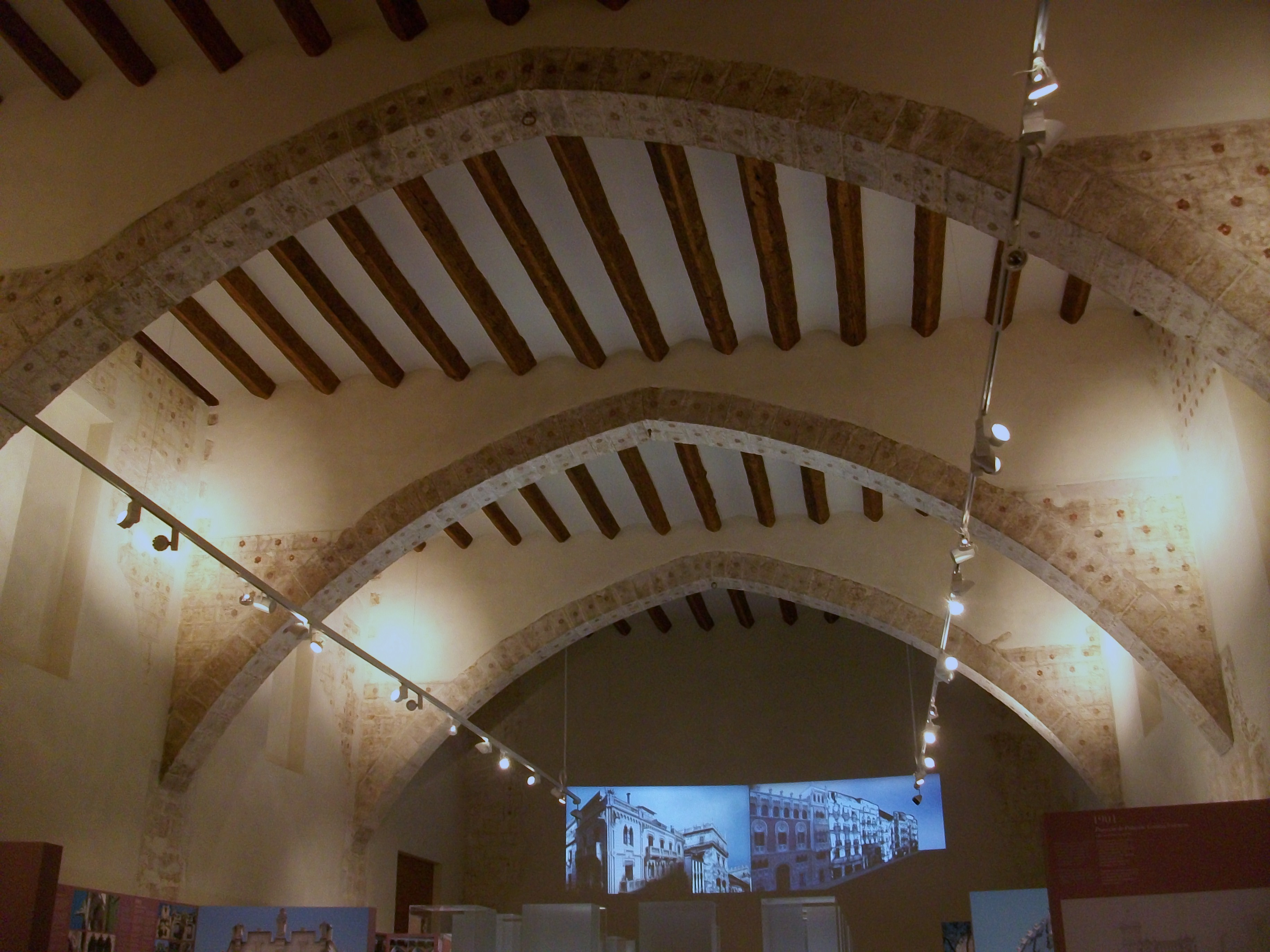 Antic refectori del convent del Carme de València, actualment una de les sales d'exposició del Centre del Carme.